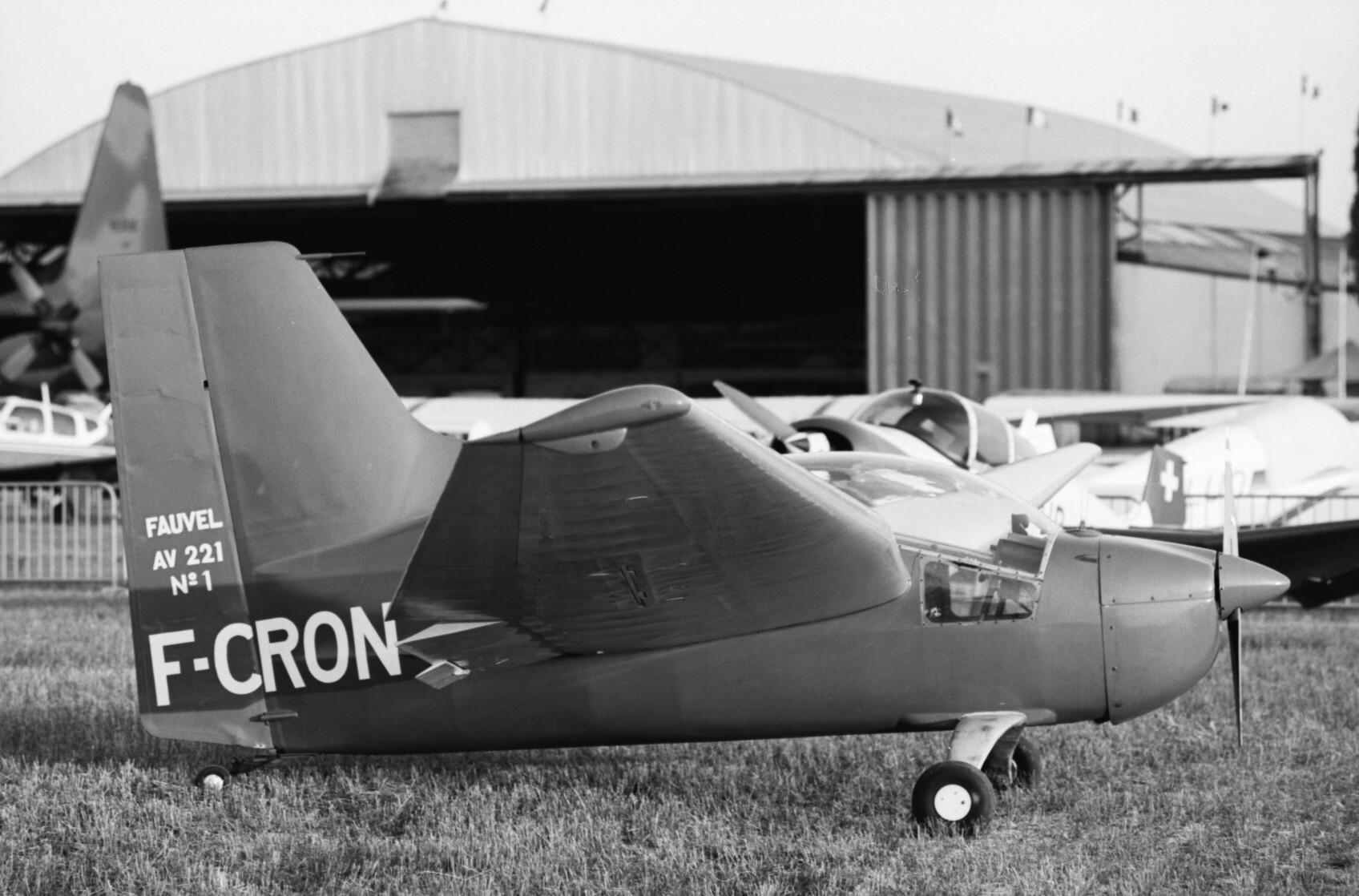 F-CRON Fauvel AV 221